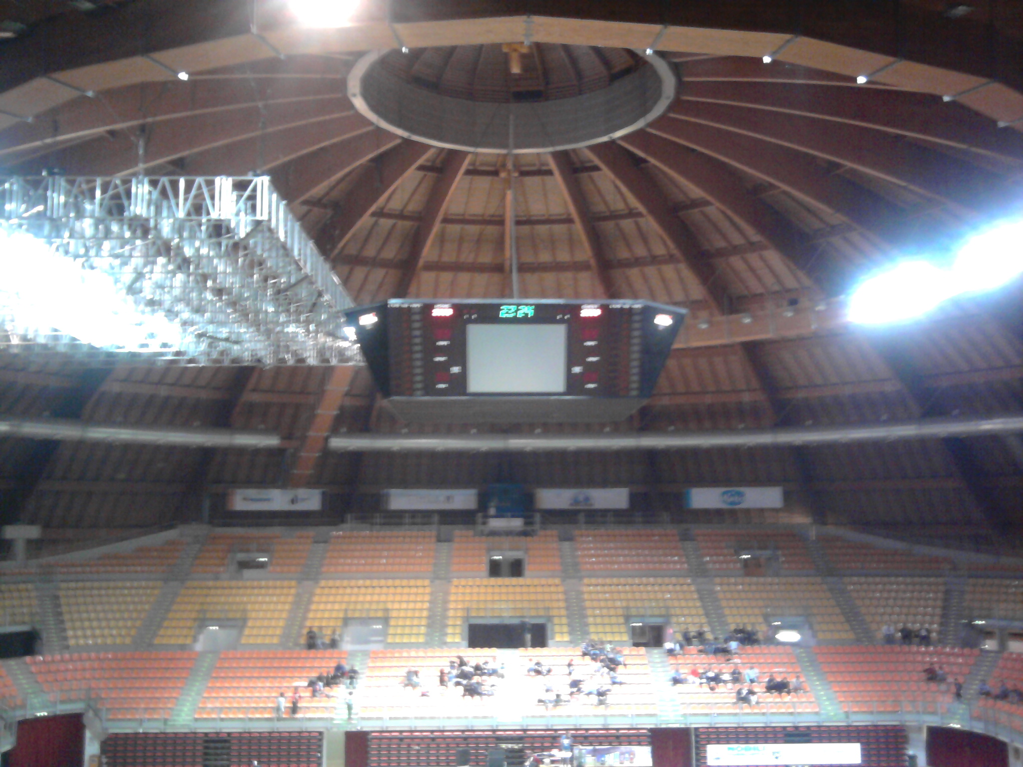 L'interno del Modigliani Forum.